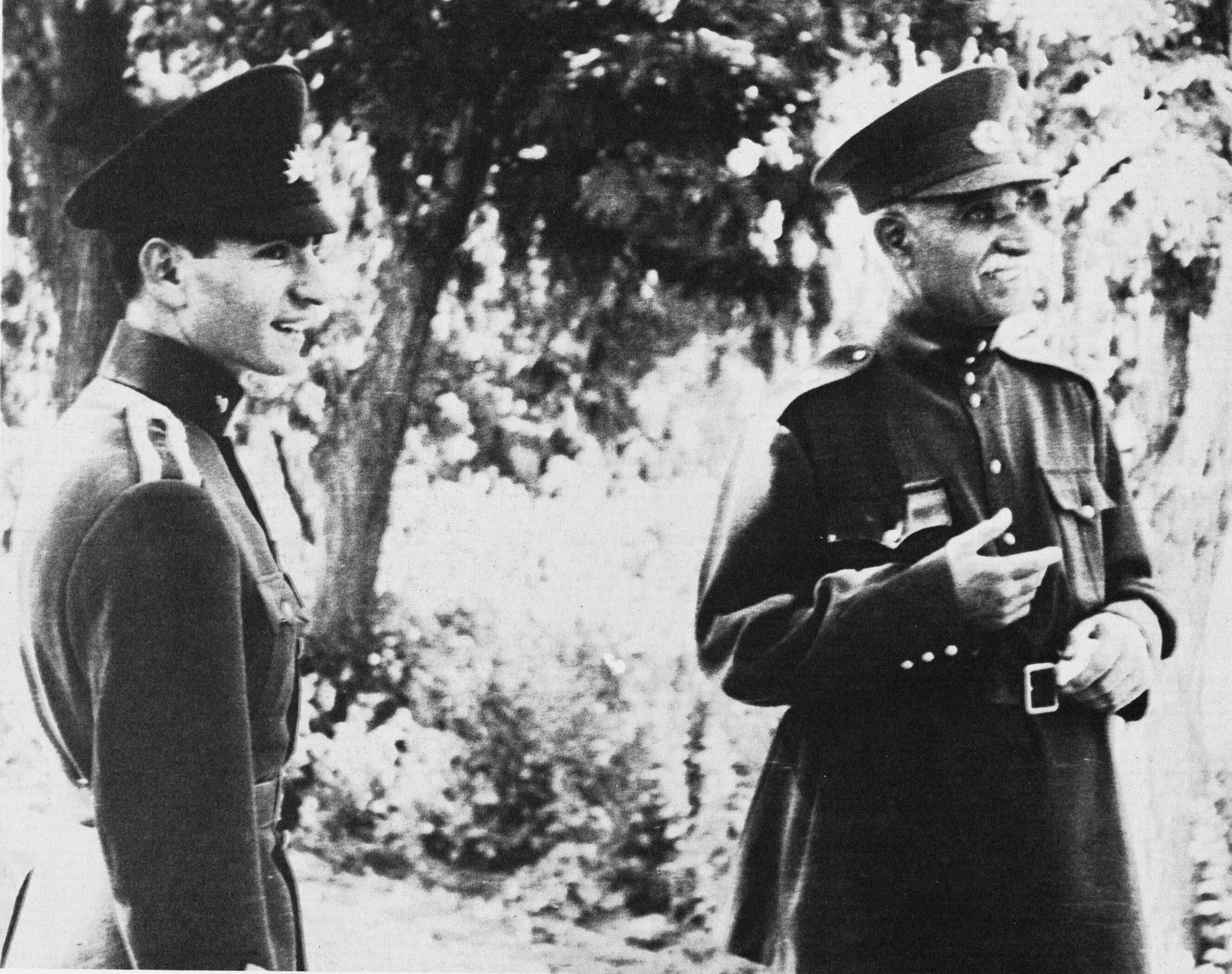 Reza Chah et le prince héritier Mohammad Reza